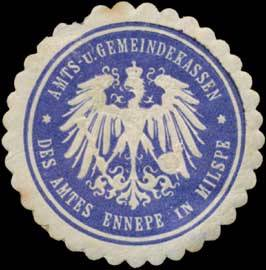 Sealing stamp Title: Amts- und Gemeindekassen des Amtes Ennepe in Milspe Description: blau, weiß, geprägt Place: Ennepetal-Milspe size: 4 cm